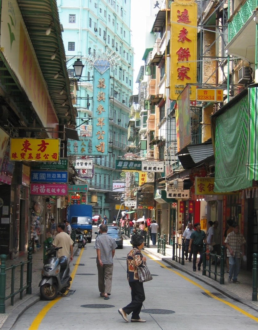 Street scene Macau